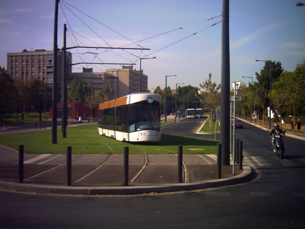 Une rame en manoeuvre au terminus des Caillols